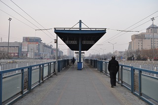 中文（中国大陆）: 独有的岛式站台